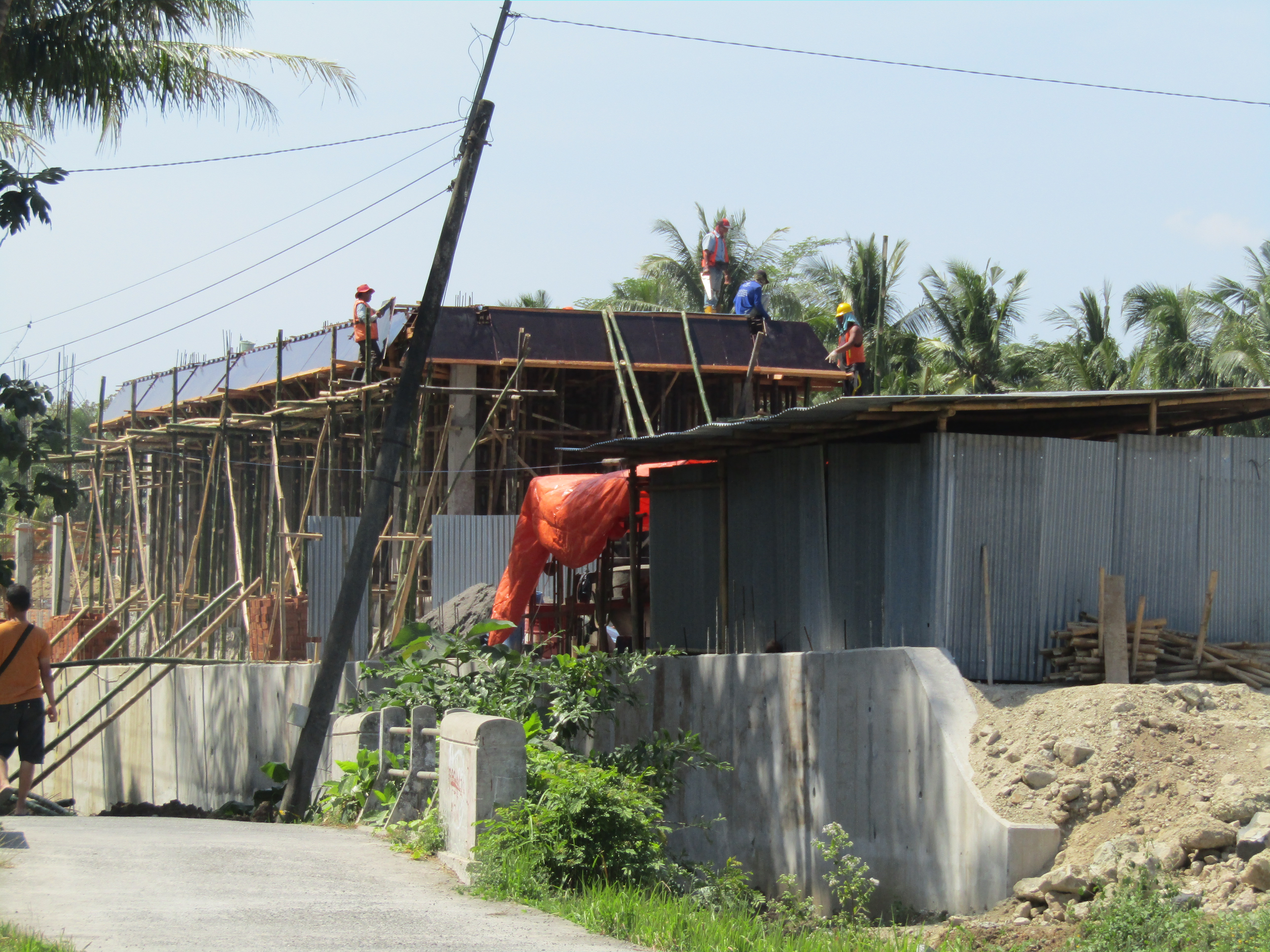 Pembangunan gardu blok intermediet Stasiun Kedundang, 2020